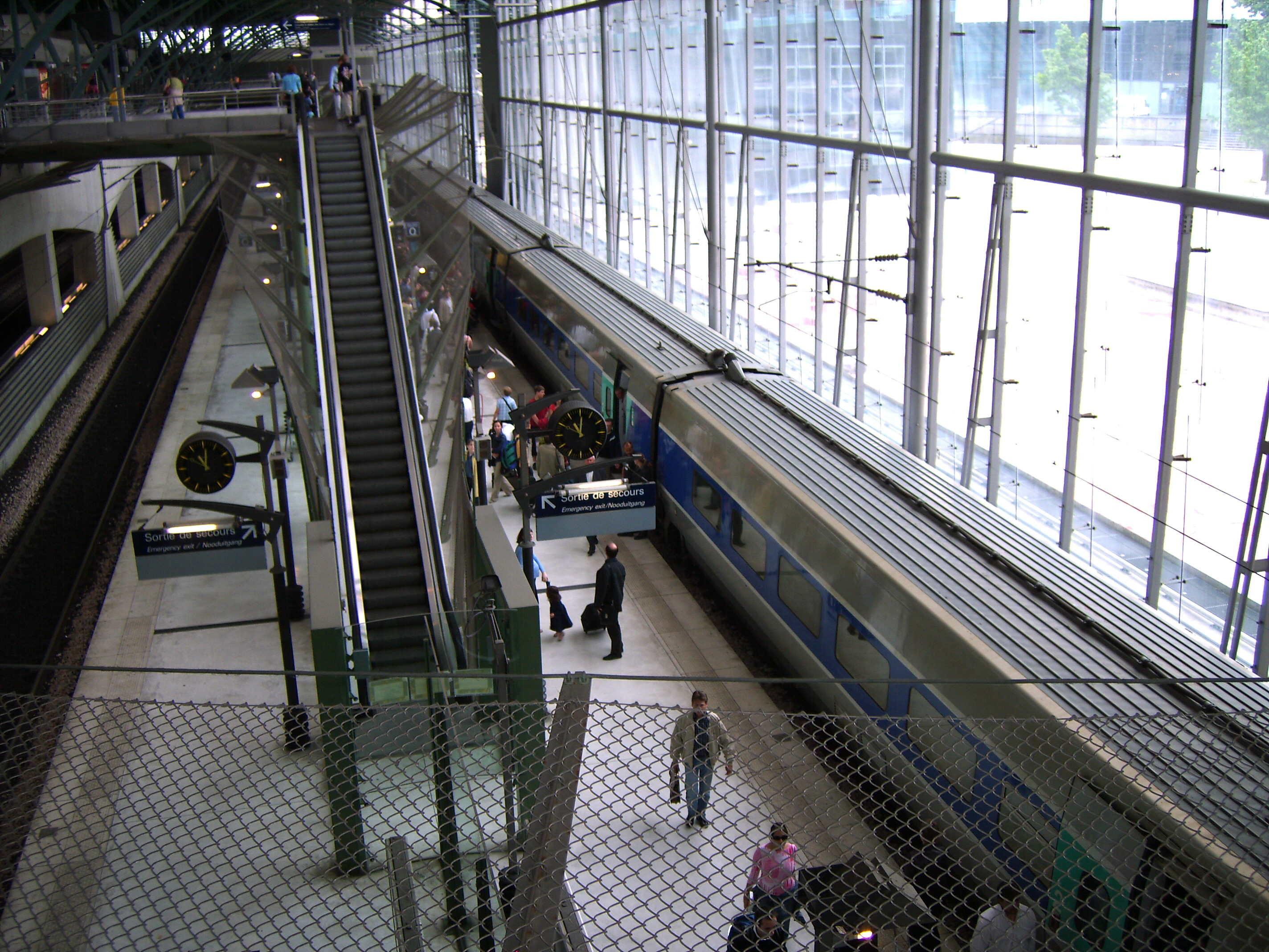 Perron Station Lille-Europe